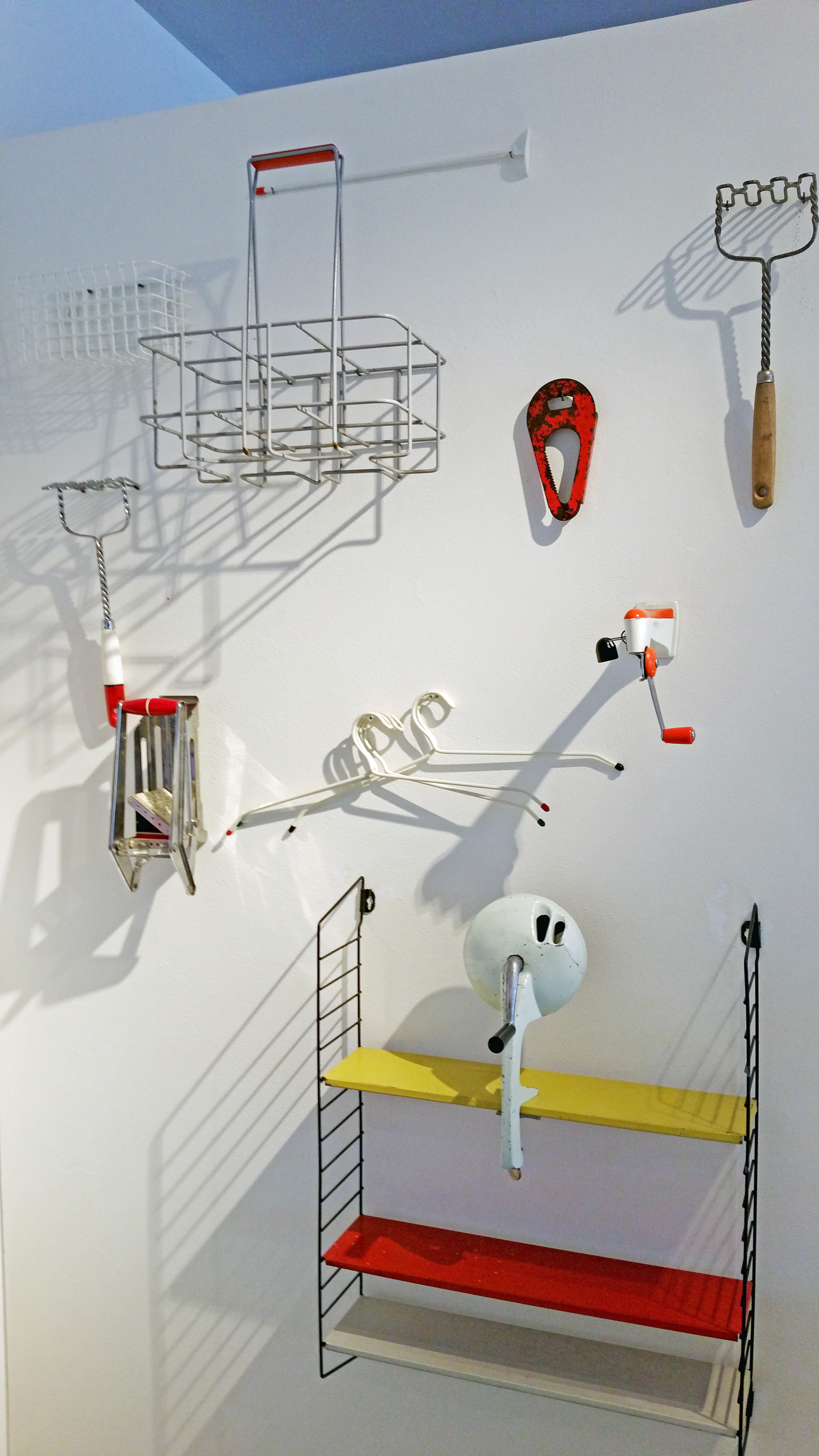 Tomado producten. Flessenlikker, snijbonenmolen, wandblikopener, flessendrager, frietsnijder, wandrekje met 3 plankjes, kledinghangertjes, puree/stamper. Gefotografeerd in het Museum Jan van der Togt. Van der Togt was met zijn broer oprichter van de Tomadofabriek